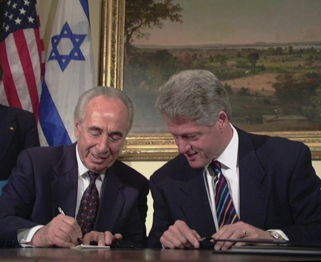 Prime Minister Shimon Peres shows US President Bill Clinton how to write his first name in Hebrew during the signing of an anti-terrorism cooperation agreement at the White House. ביקור ראש הממשלה שמעון פרס בארצות הברית. בצילום, ראש הממשלה שמעון פרס (משמאל) מלמד את נשיא ארה"ב ביל קלינטון איך לכתוב את שמו בעברית, בעת טקס החתימה על הסכם לשיתוף פעולה נגד הטרור בבית הלבן בוושינגטון.